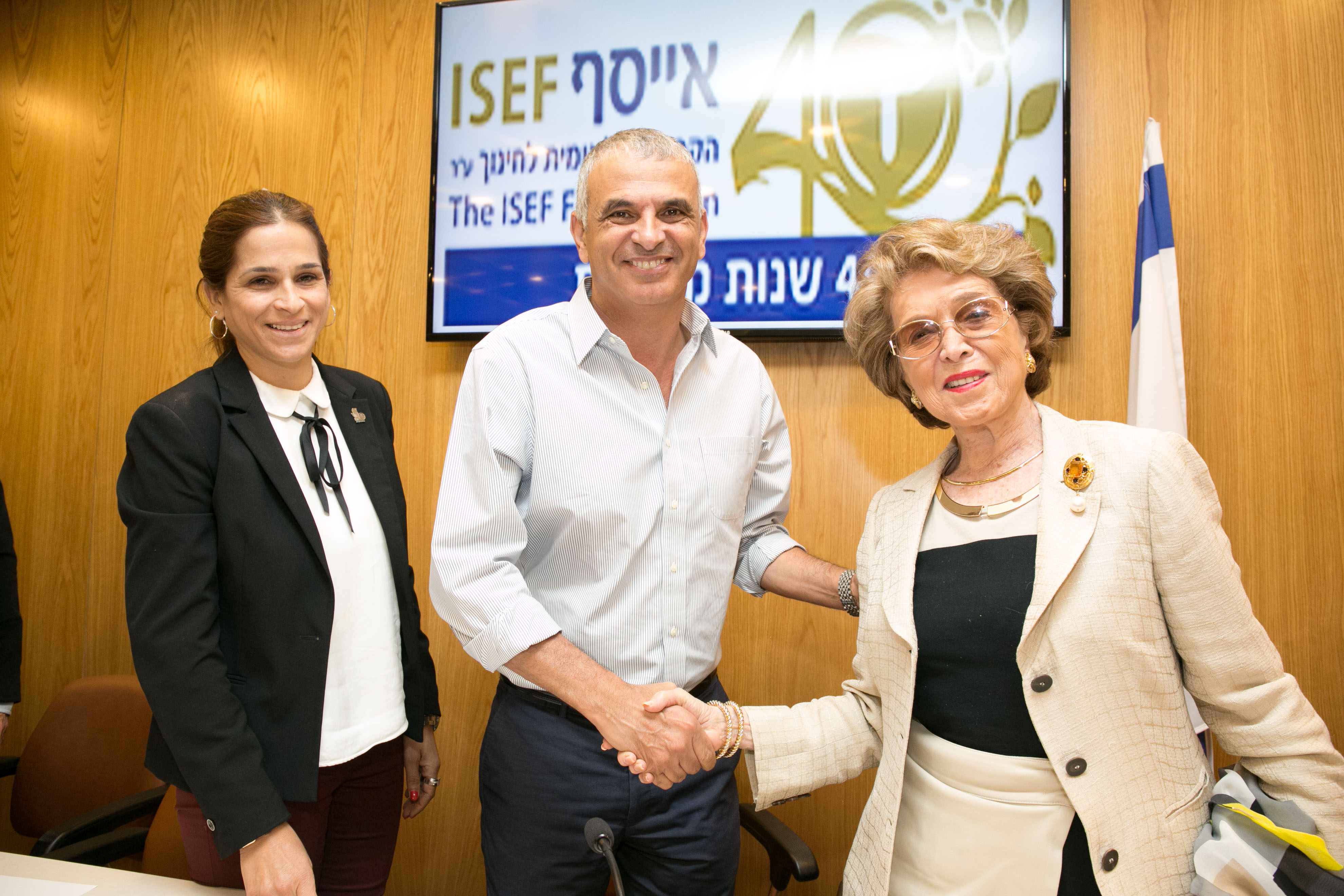 נינה ווינר, משה כחלון ומירב בן ארי צילום - עופר עמרם